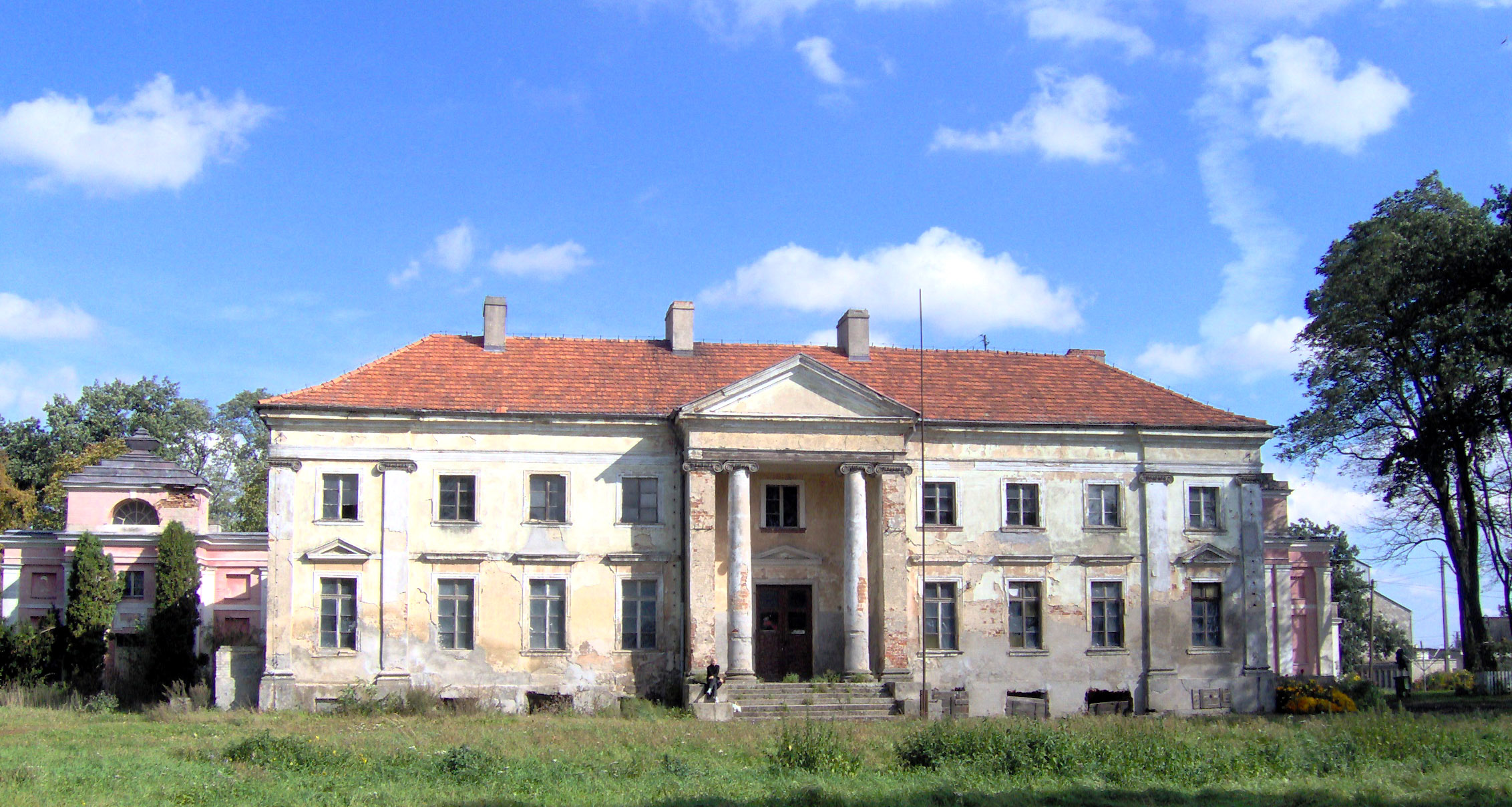 Nawra - pałac, 1798-1805, 1870-1871, 1940-1941